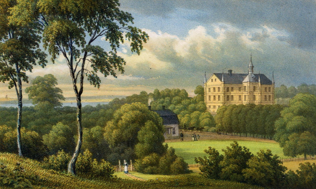 Torsåkers herrgård